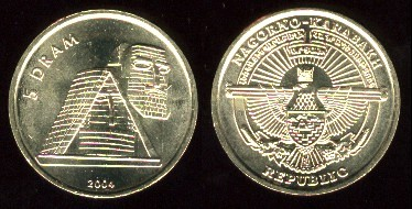 5 Dram